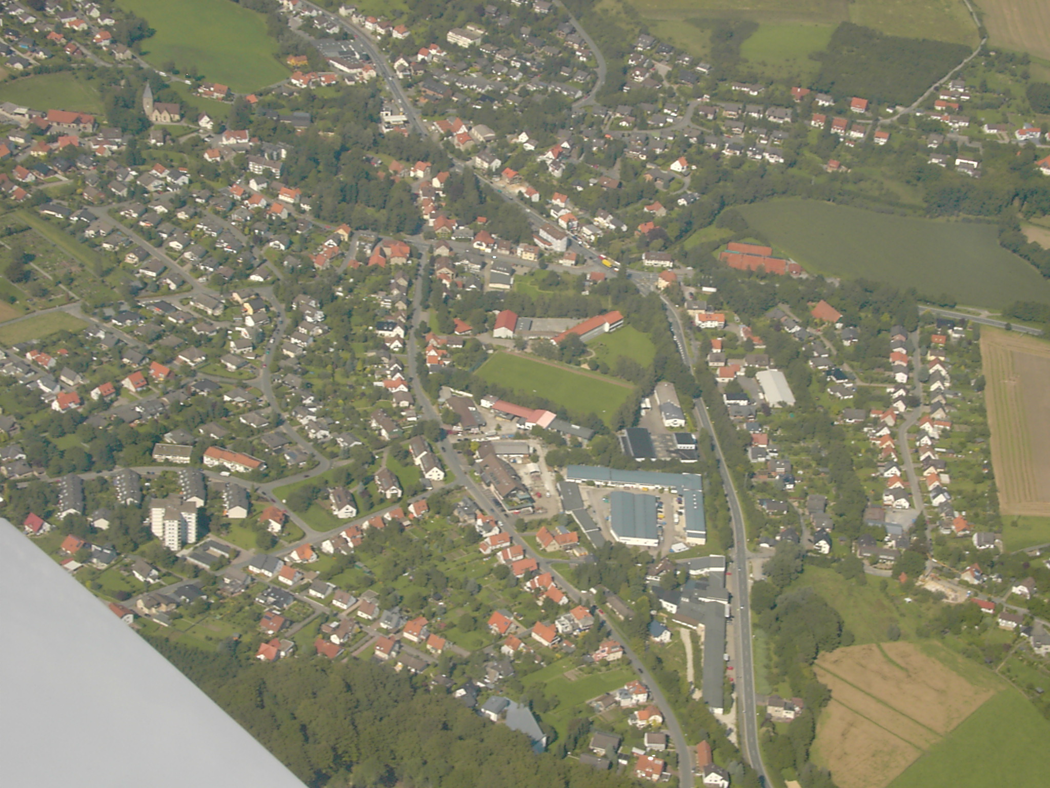 Heiligenkirchen, Ortsteil von Detmold im Kreis Lippe, Nordrhein-Westfalen